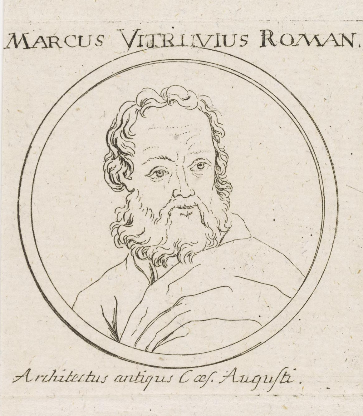 (Fantasie-)Bildnis des Vitruv, Radierung 68 × 67 mm (2.68 × 2.64 in) (Platte), Umschrift: Marcus Vitruvius Roman. Architectus antiqus Caes. Augusti.